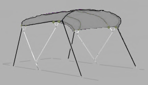 Bimini Verdeck Schema-Zeichnung, Christof Furch